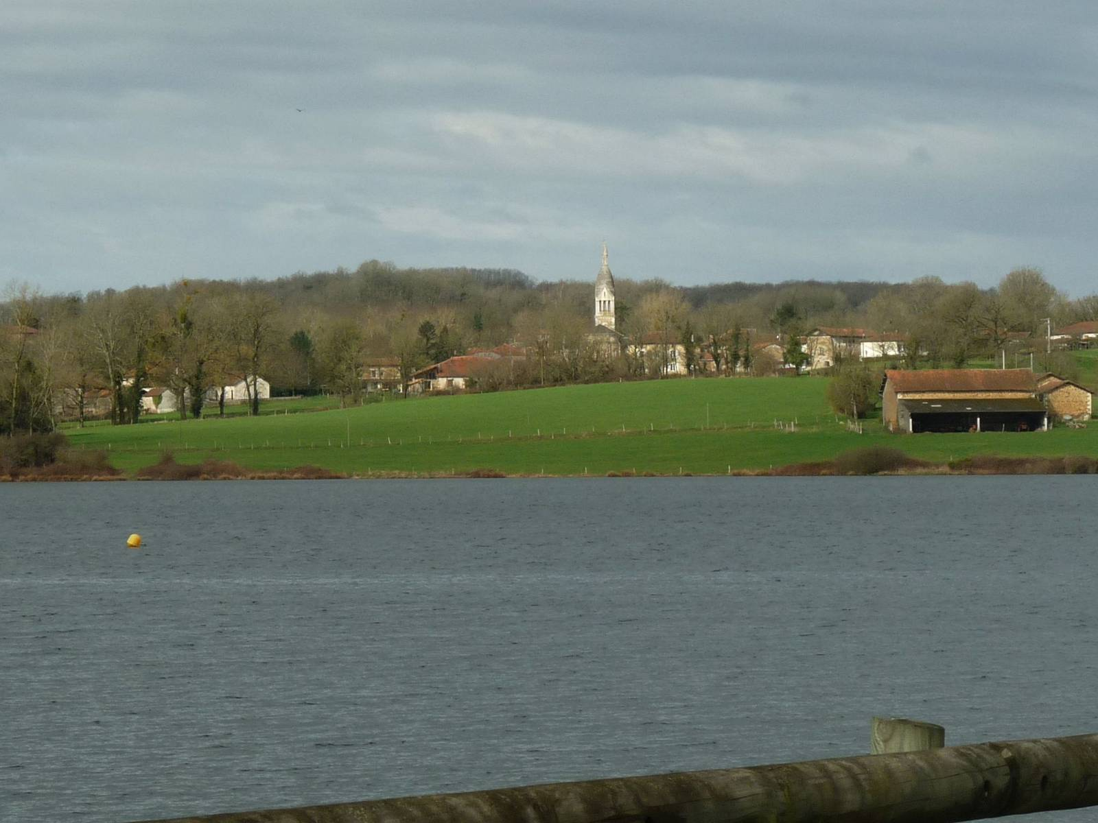 lac du Mas Chaban devant Lésignac-Durand, Charente, France